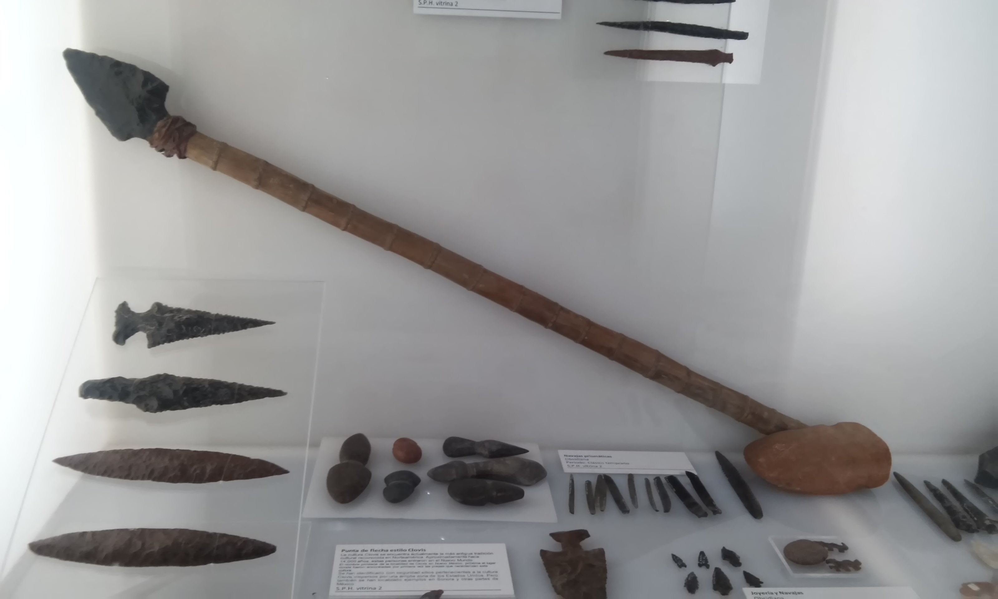 Puntas proyectil de tecuexes de Tepatitlan